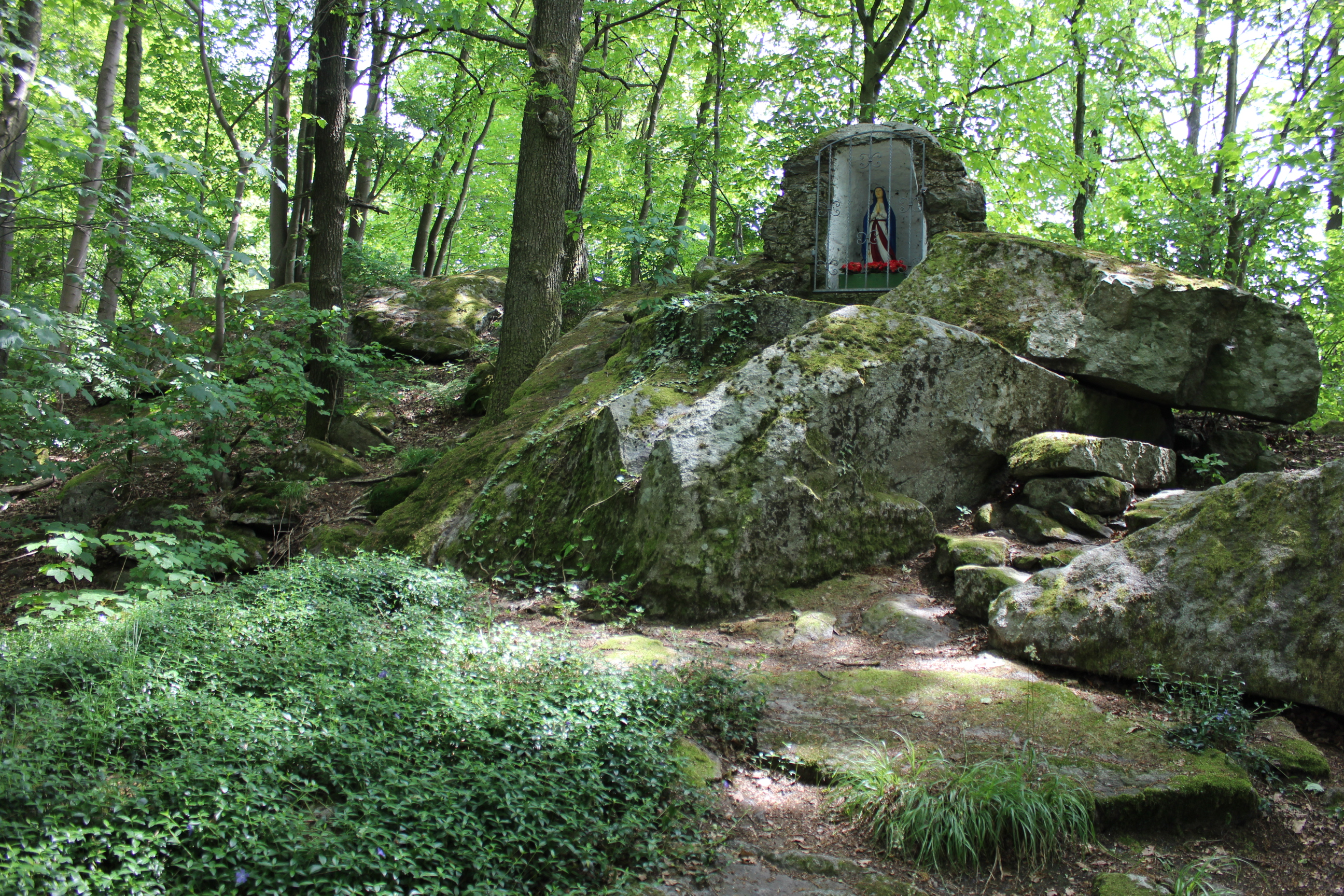 Die Grotte am Ortsrand von Wiesenfelden gehört zur Liste der Geotope im Landkreis Straubing-Bogen mit der Nummer 278R007. Sie ist über einen bequemen Fußweg ab dem Felsenkeller zu erreichen.